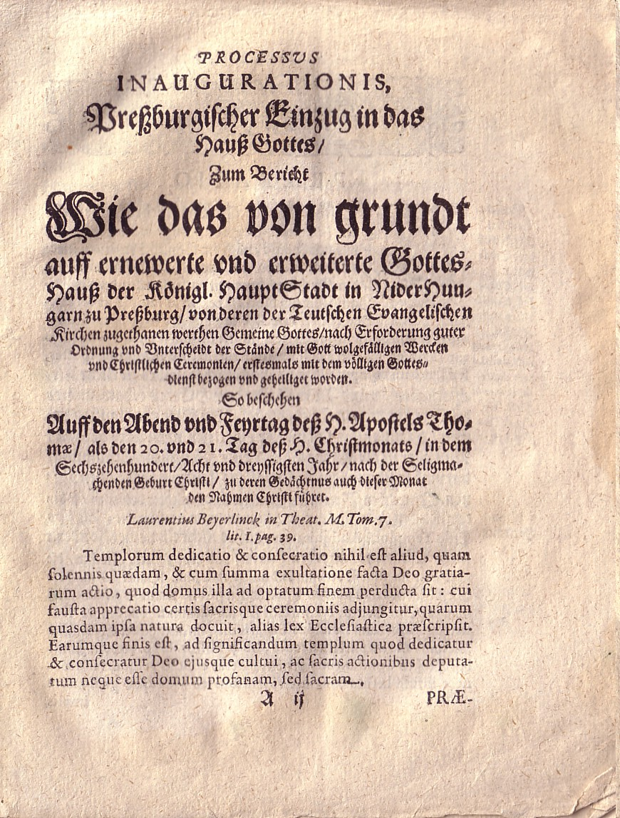 Einweihung der ersten Deutschen Evangelischen Kirche A.B. zu Pressburg; Archiv des Karpatendeutschen Kulturwerkes (KDKW) in Karlsruhe